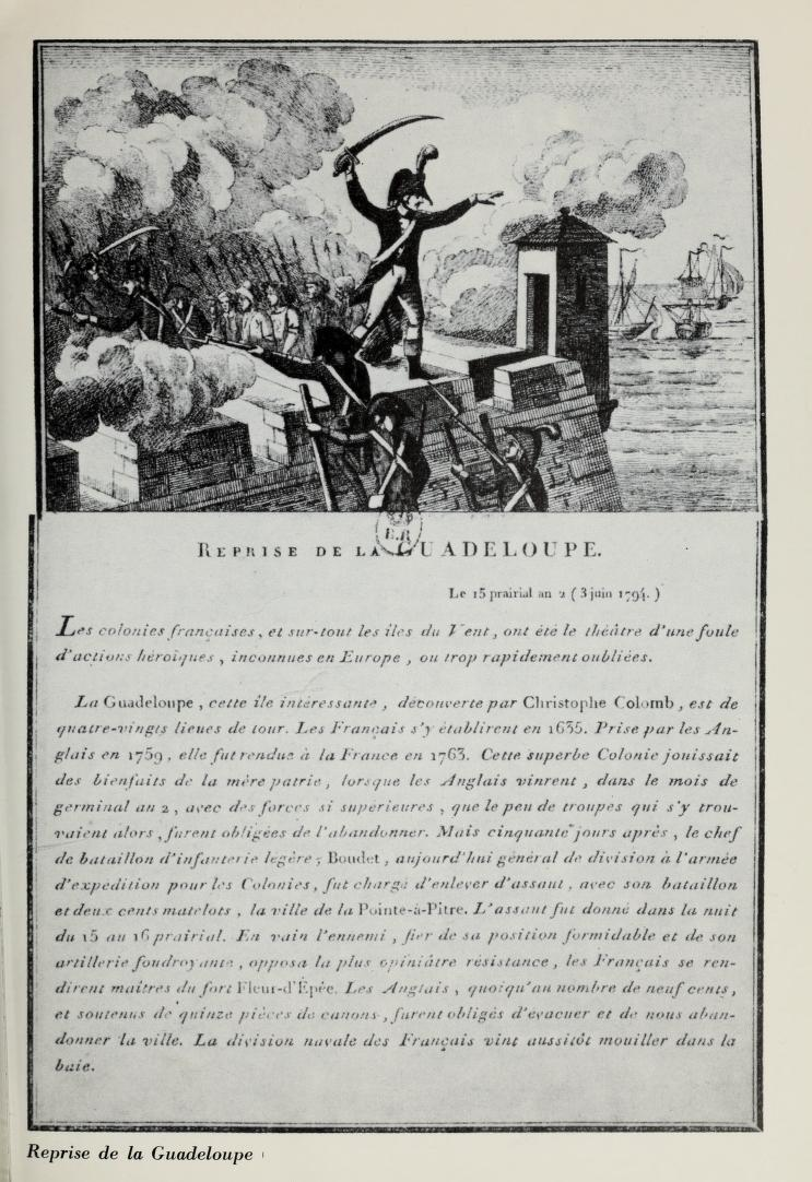 Reprise de la Guadeloupe par Victor Hugues, gravure in Auguste Lacour.- Histoire de la Guadeloupe, Basse-terre, 1857. Tome Deuxième, 1789-1798. Réimpression : Edition et Diffusion de la culture antillaise, 1976.